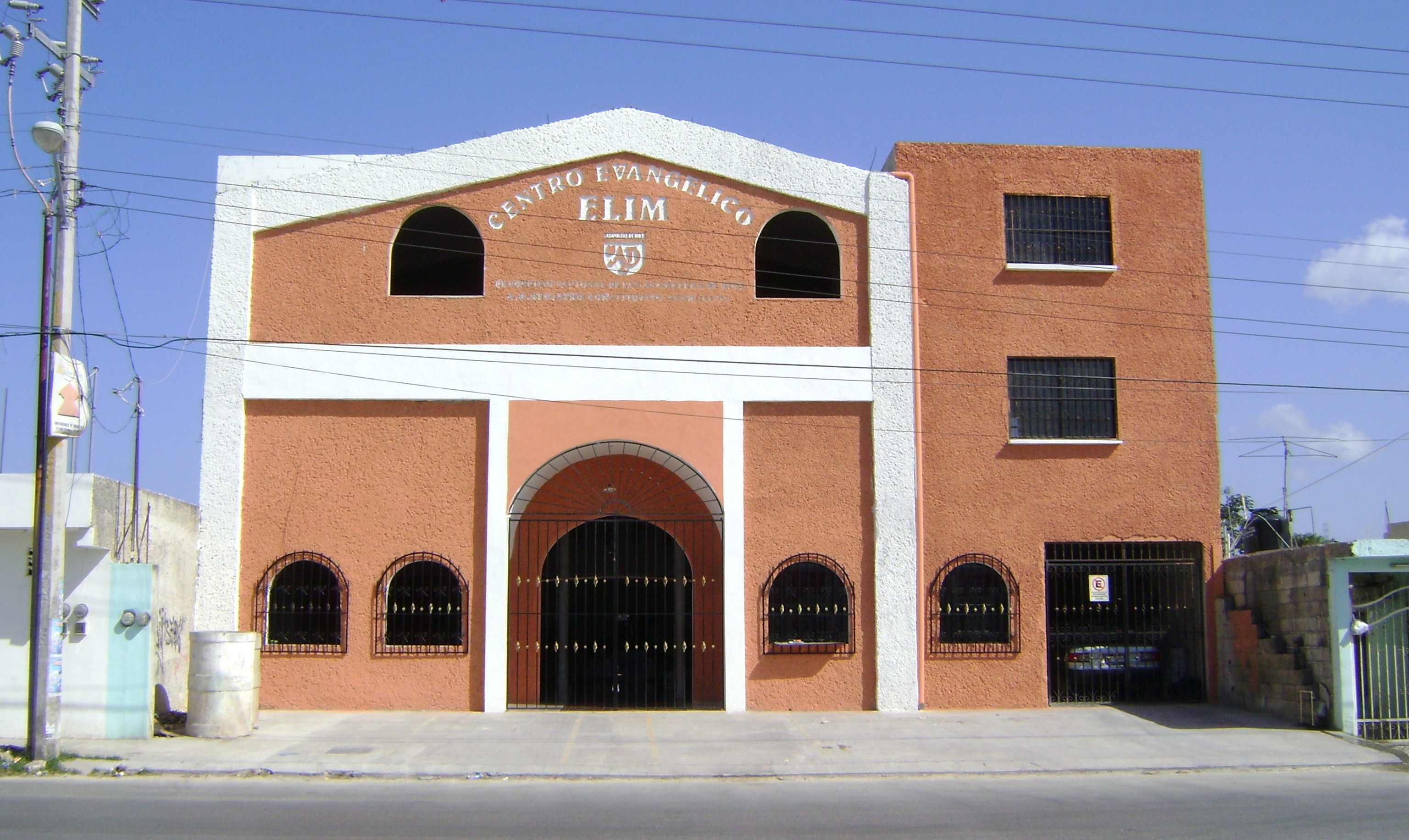 Centro Evangélico Elim de El Concilio Nacional de las Asambleas de Dios, A.R. Cancún, Quintana Roo, México.